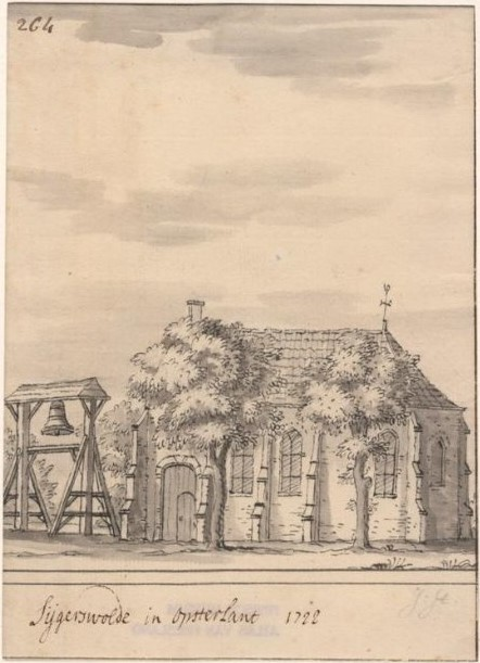 Gezicht op de kerk te Siegerswoude in Opsterland. Tekening van Jacobus Stellingwerff uit 1722.